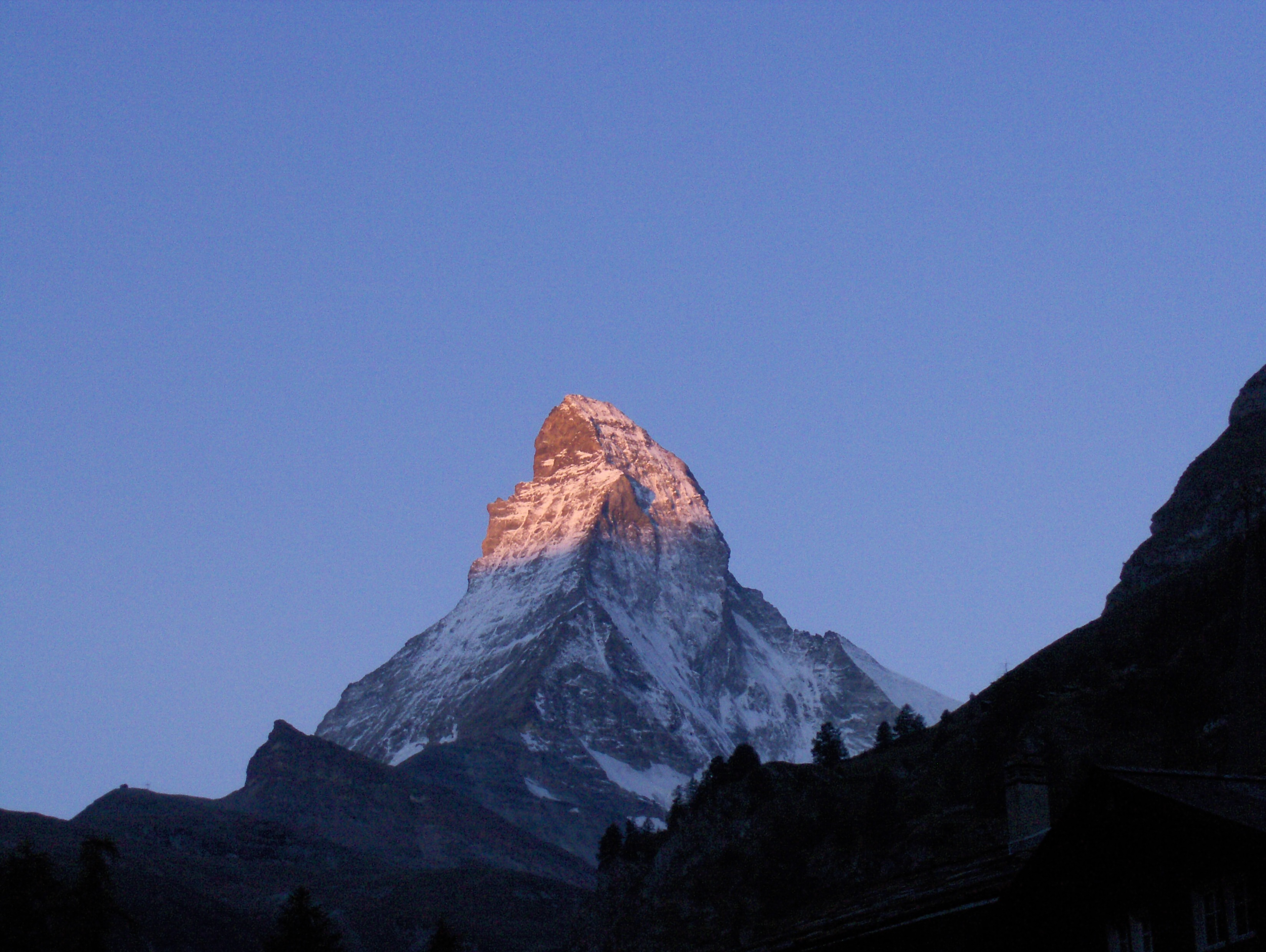 Lever de soleil sur le Cervin, depuis Zermatt.